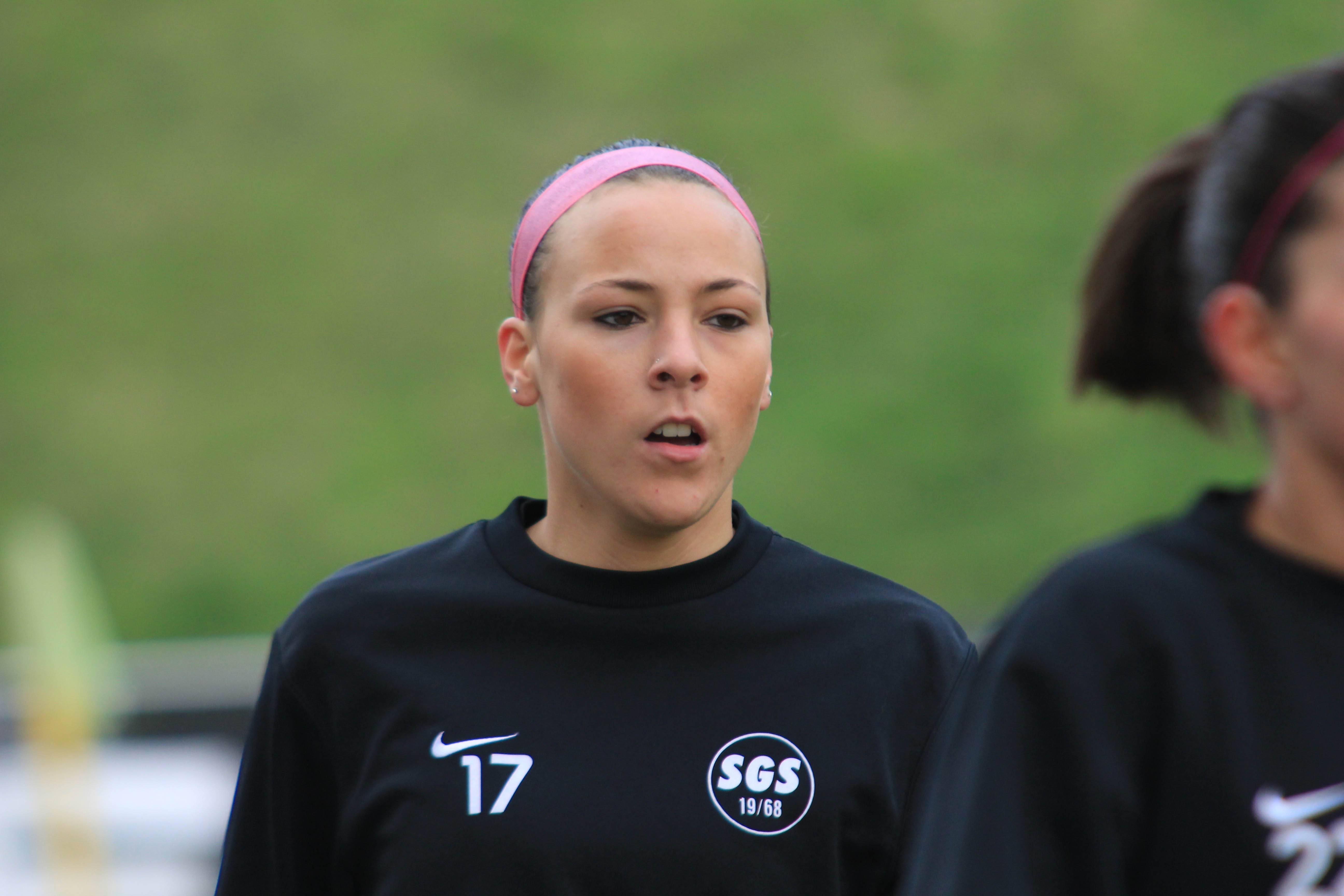 German-Portuguese footballer Ana Cristina Oliveira Leite, SG Essen-Schönebeck